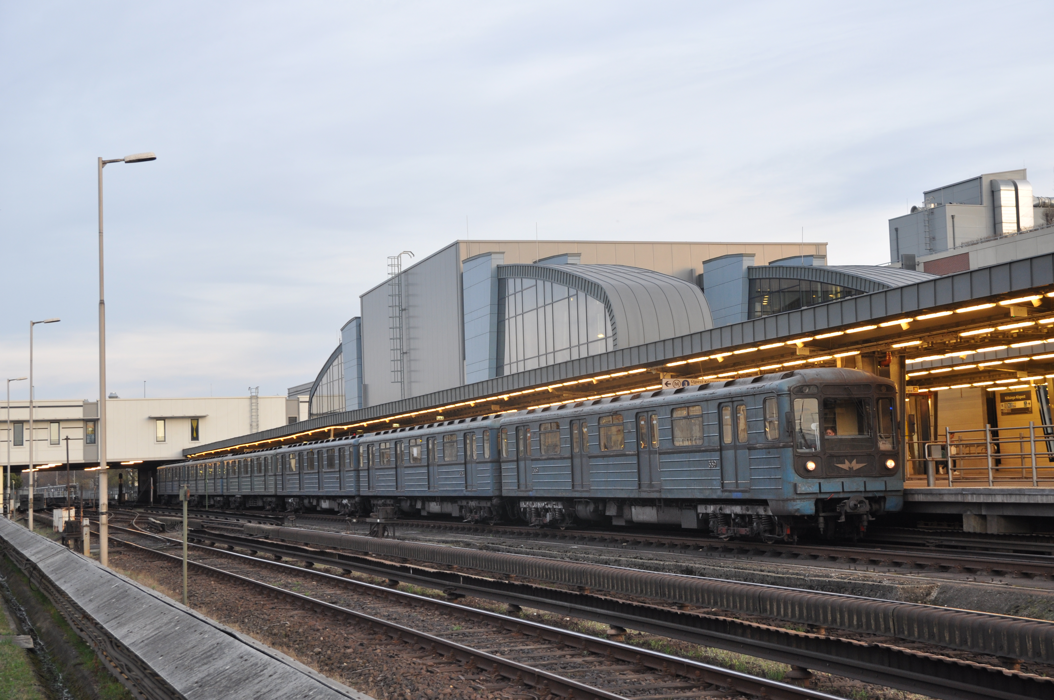 Budapest, metró 3, Kőbánya-Kispest